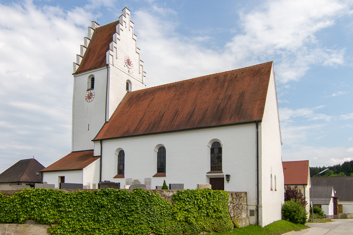 Kath. Pfarrkirche St. Germanus; Langhaus um 1200, Chor 15. Jahrhundert, 1930 umgebaut; mit Ausstattung.This is a photograph of an architectural monument.